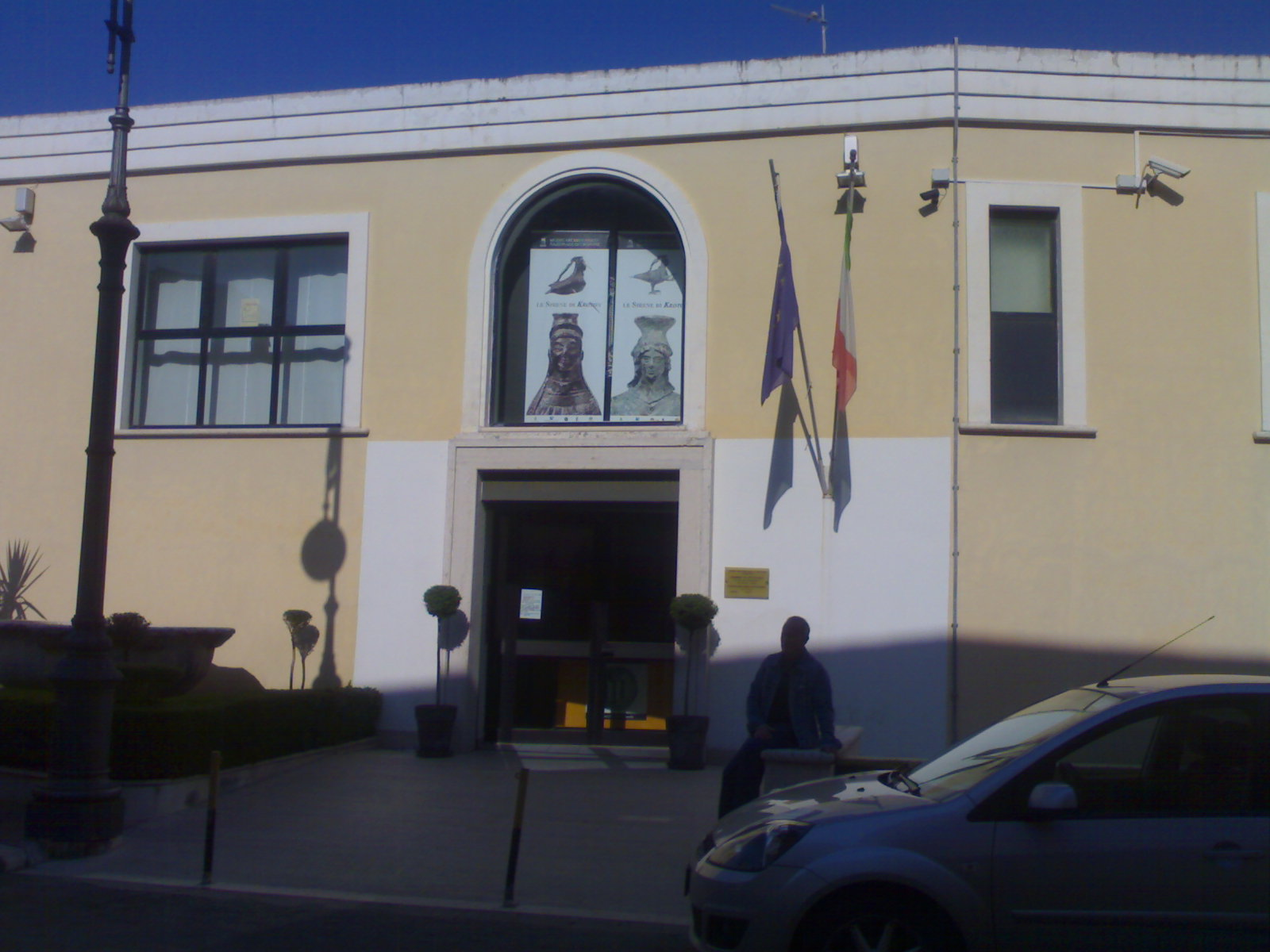 Museo Archeologico Nazionale di Crotone